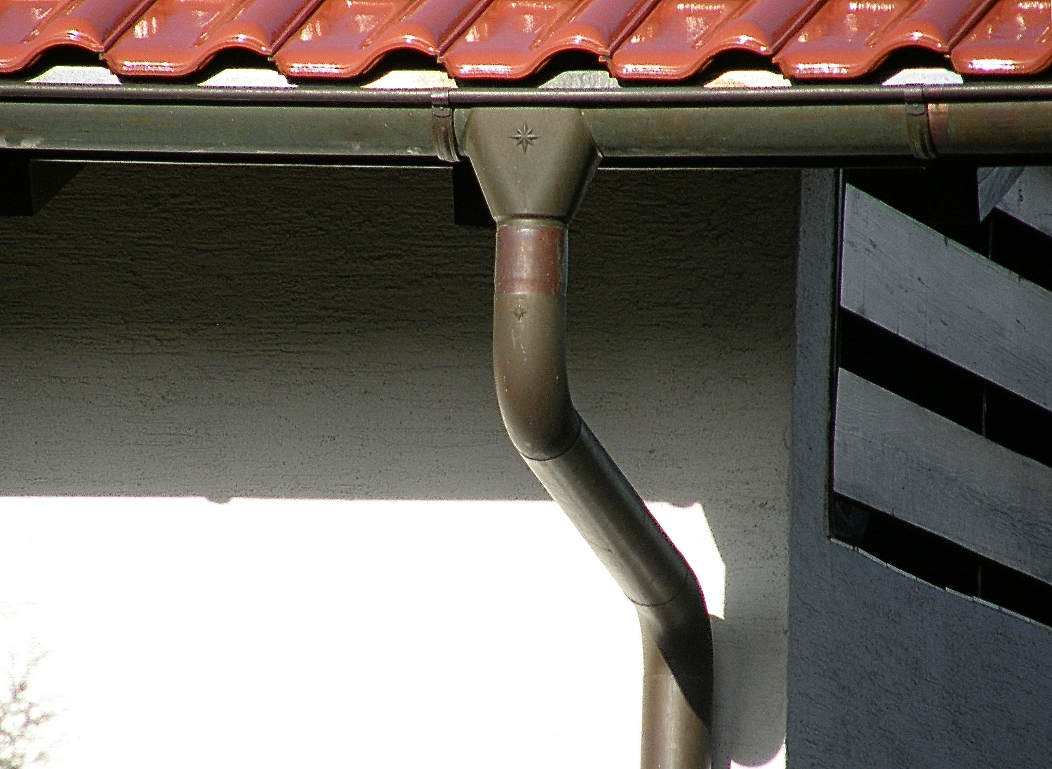 Einlaufstutzen/Trichter an einer Dachrinne, unter glasierten Ziegeln.